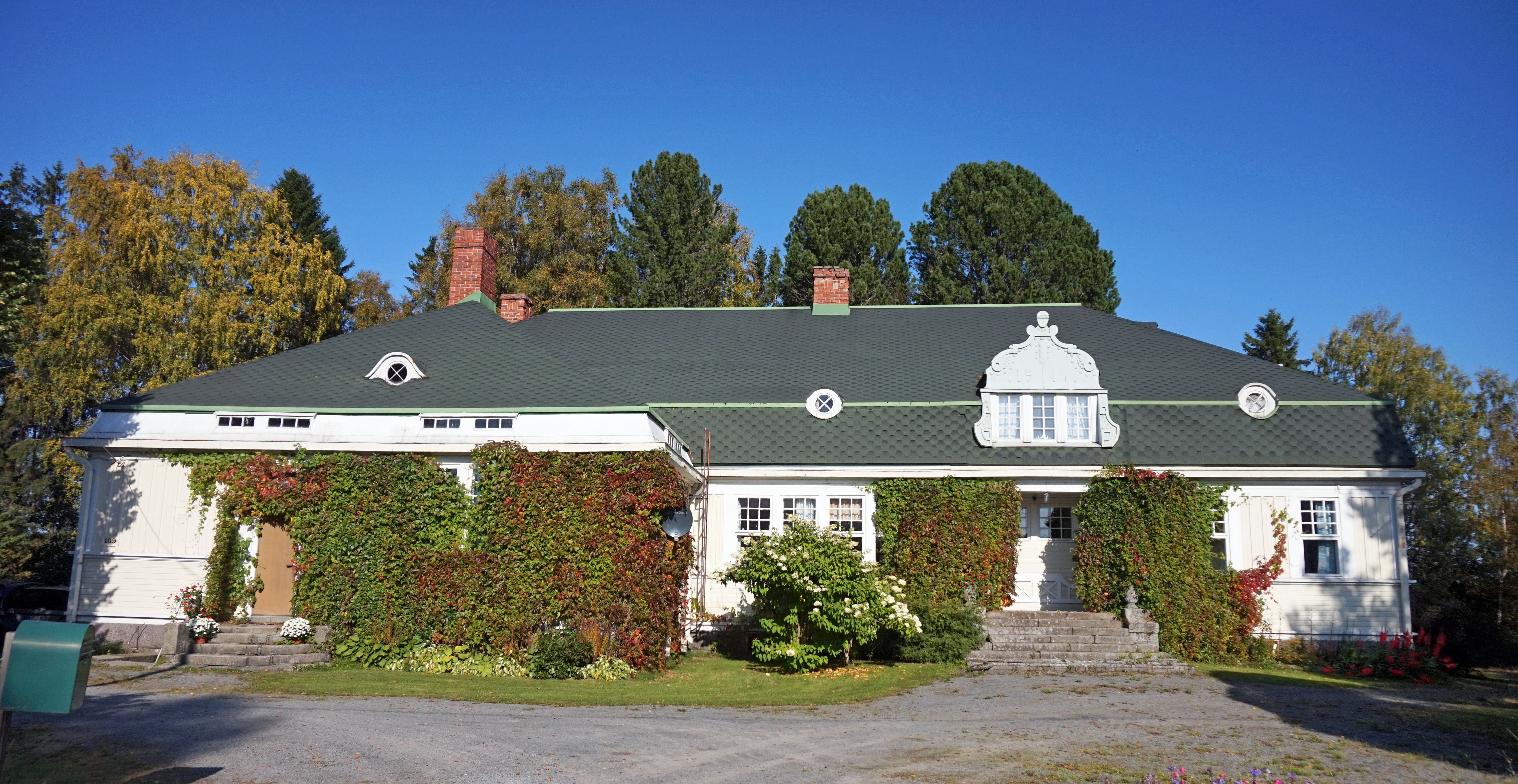 Saaren kartano, Jämsä.